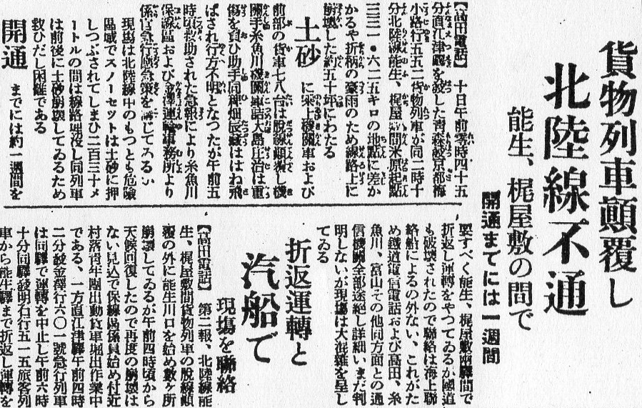 1929年（昭和4年）8月10日、北陸本線能生 - 梶屋敷間列車顚覆事故の記事